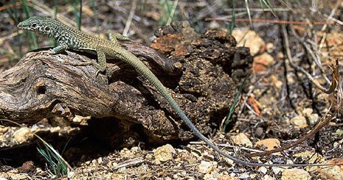 Cnemidophorus_tigris_multiscutatus